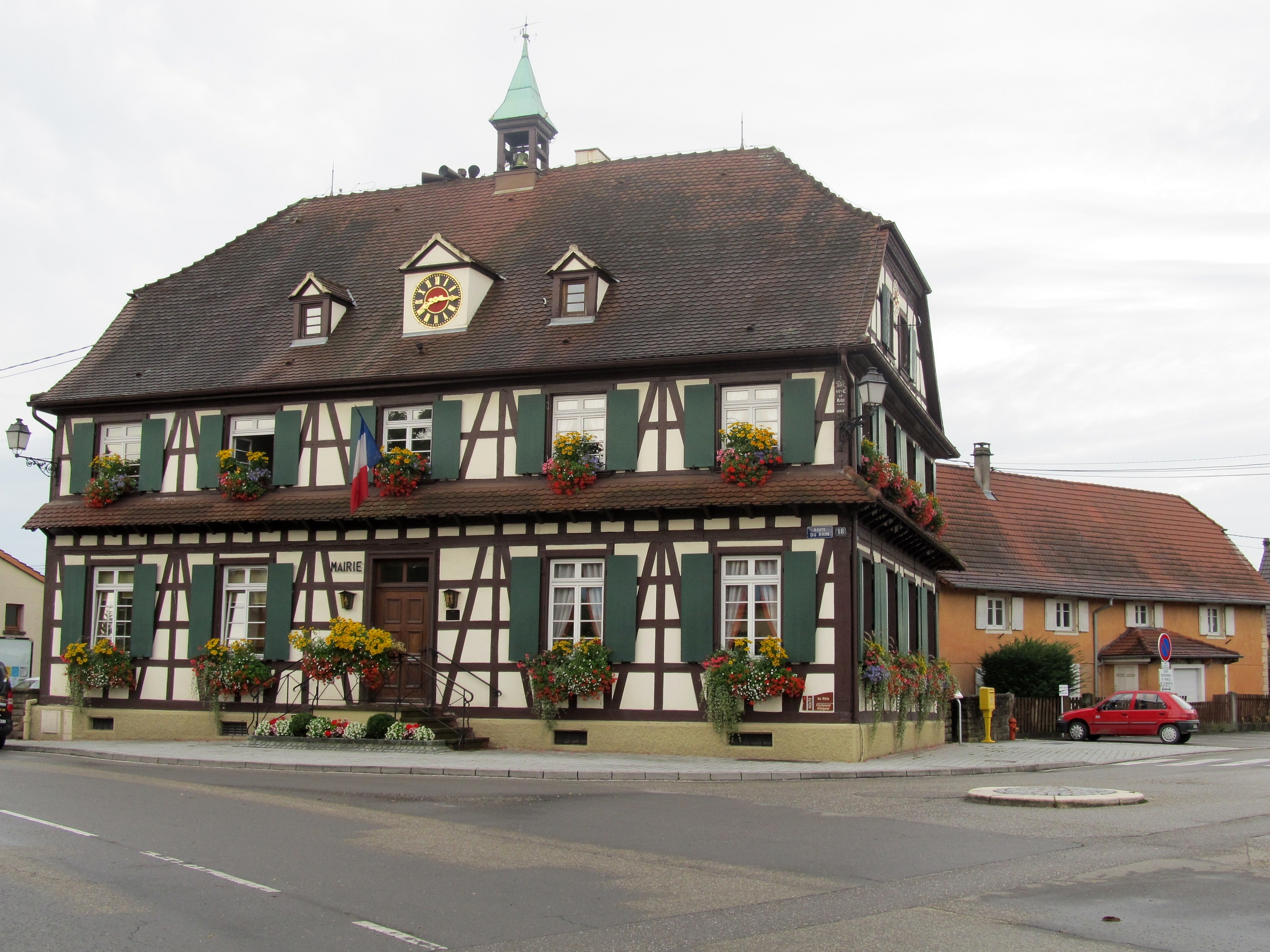 Gambsheim: la mairie